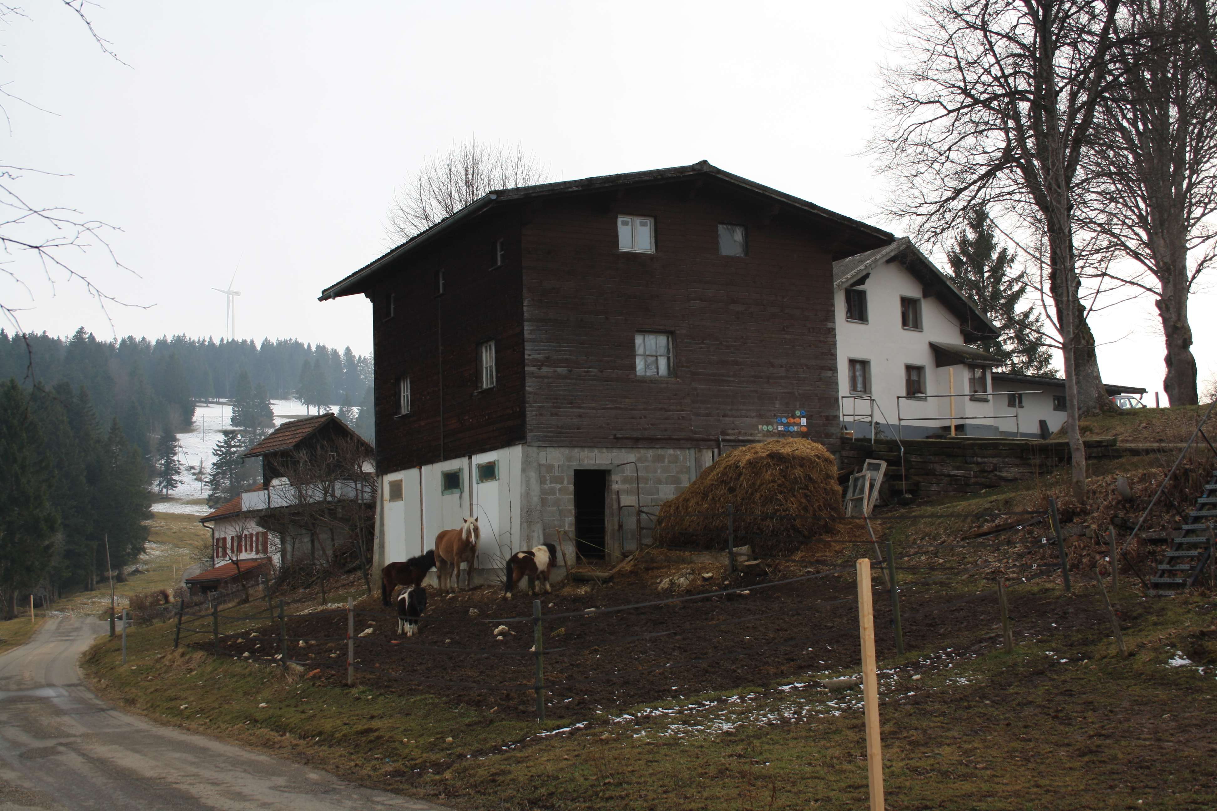 Mont-Tramelan